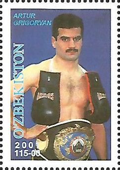 Artur Grigorian